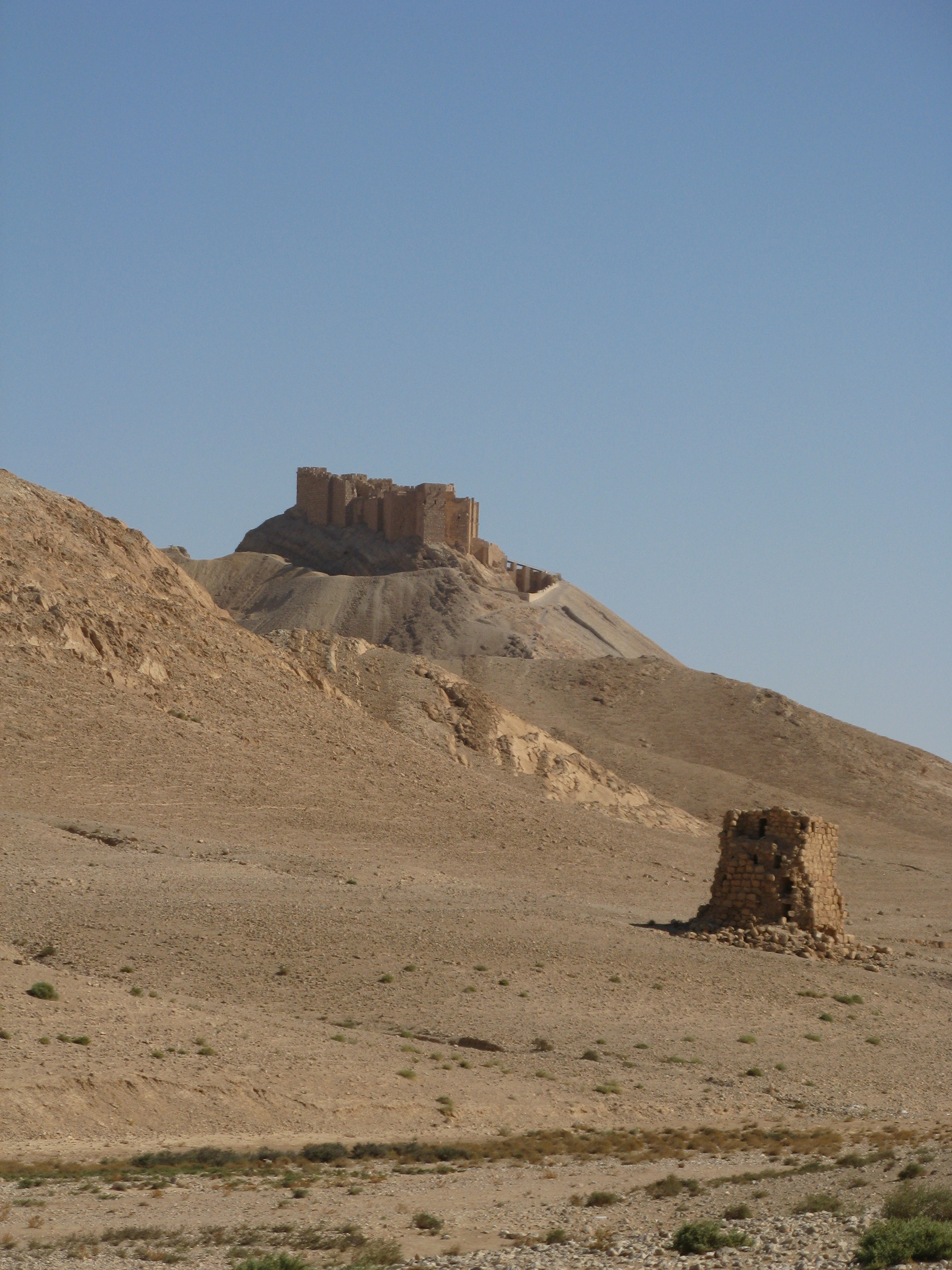 Palmyra Cittadel